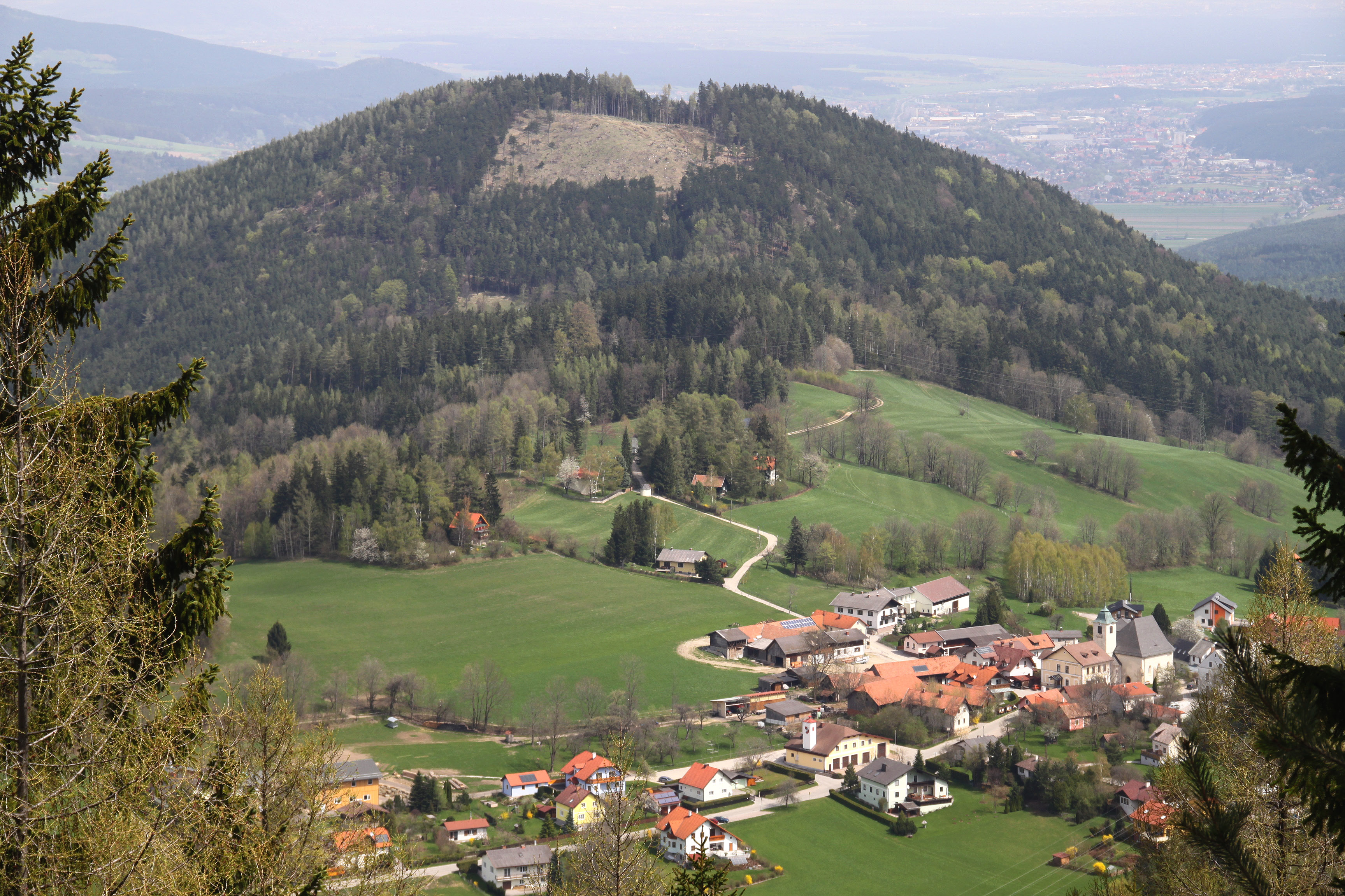 Raach am Hochgebirge und Raachberg von Südwesten